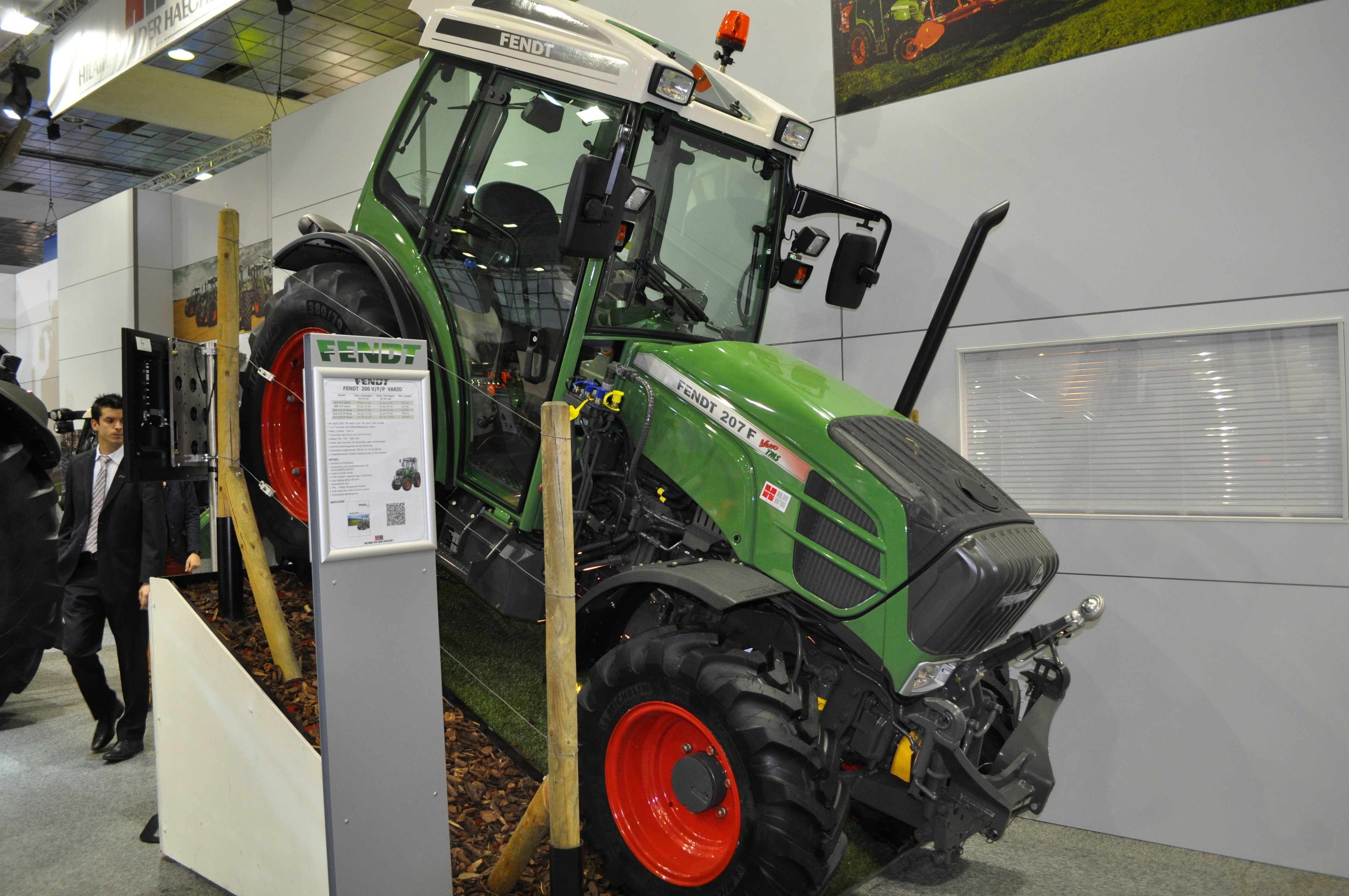 Fendt 207 vario smalspoortrekker, foto genomen op de Agribex te Brussel op 6/11/2013 bij Hilaire Van Der Haeghe